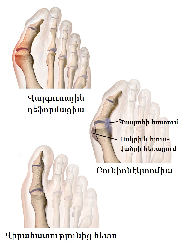 Բունիոնէկտոմիա